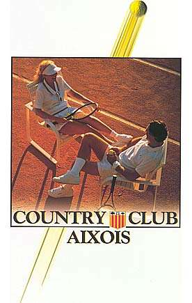 Plaquette CCA